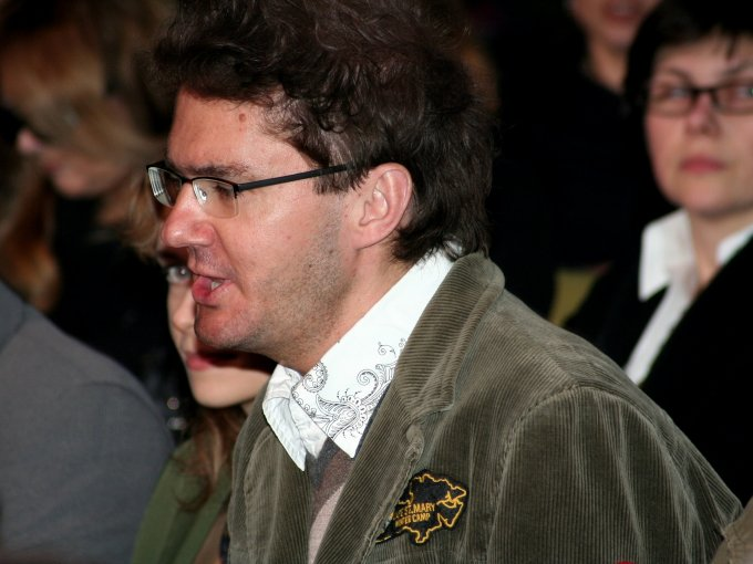 Kuba Wojewódzki, Polish journalist/showman